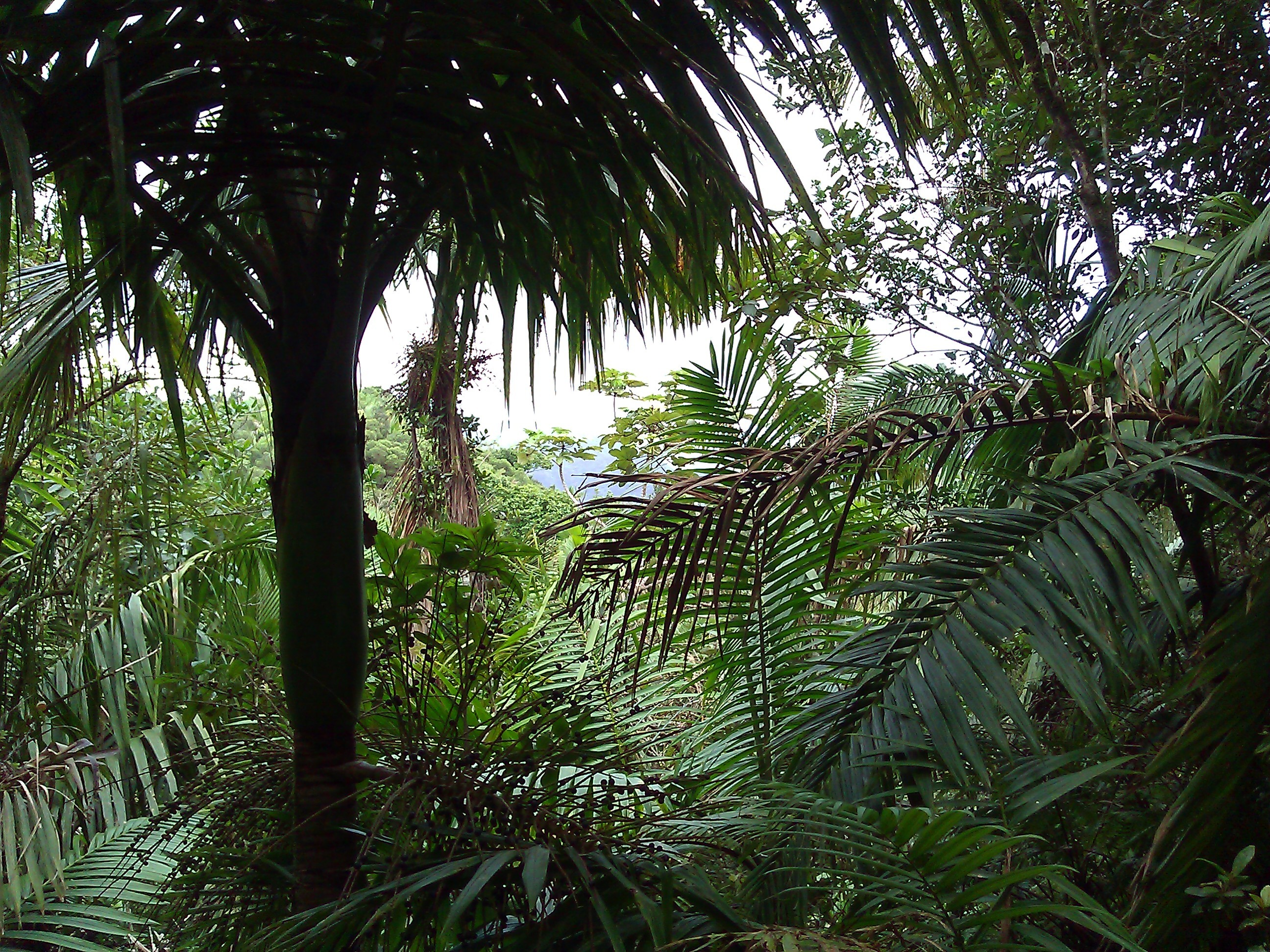 Mameyes II, Río Grande 00745, Puerto Rico